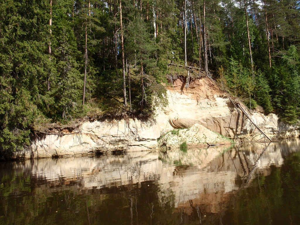 Palanumäe paljand 2015 mais